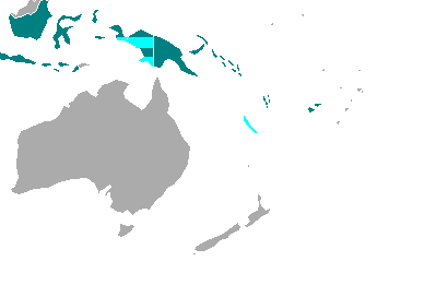 Les Etats membres du Groupe fer de lance mélanésien en 2015. Carte réalisée à partir de la carte 'vide' de l'Océanie : File:BlankMap-Oceania.png .